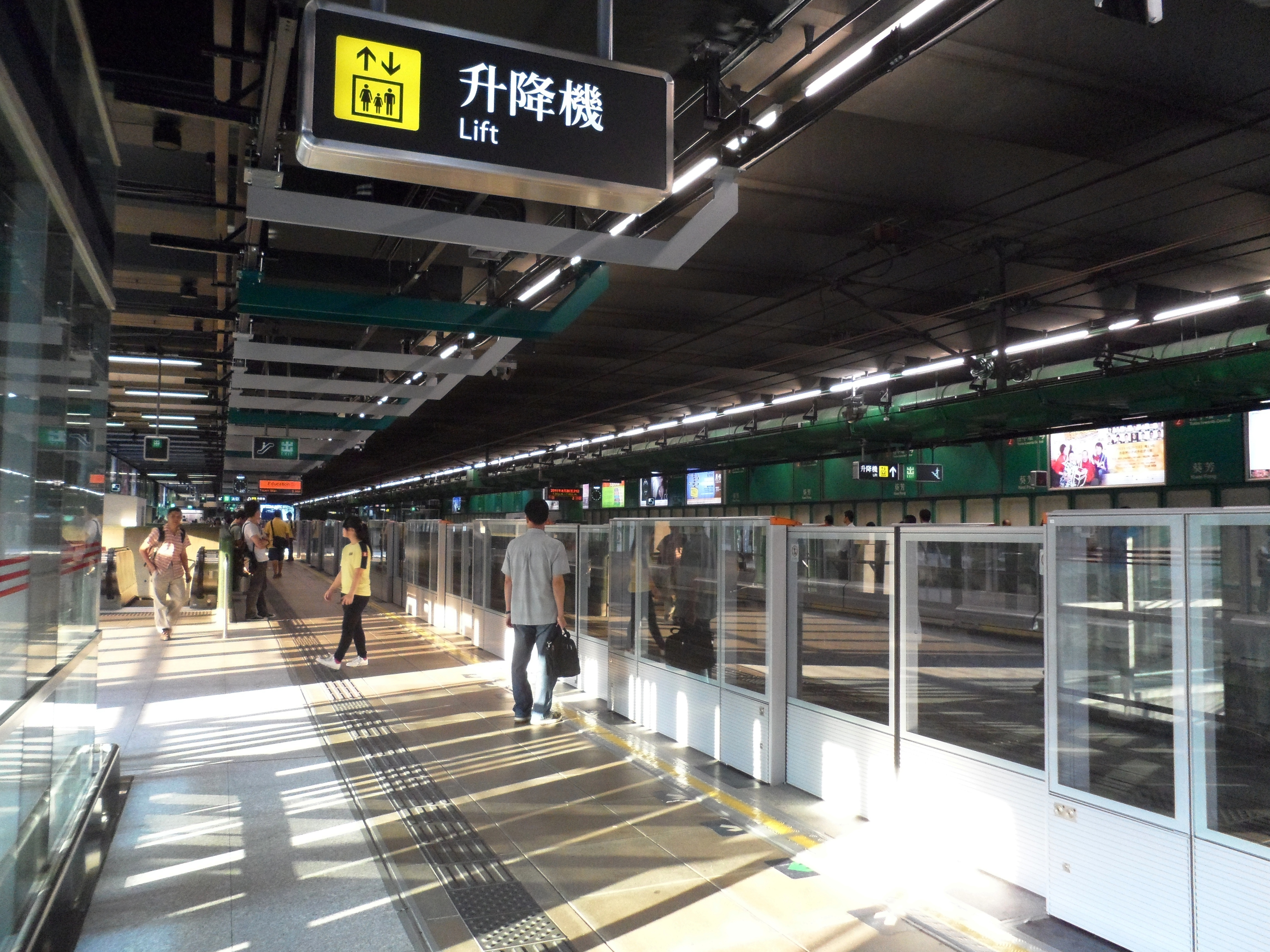 葵芳站月台